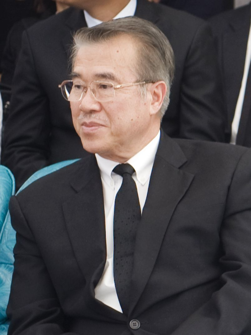 บัญญัติ บรรทัดฐาน / นายกรัฐมนตรีเข้าร่วมพิธีฝังศพ นายเล็ก นานา อดีตเลขาธิการ และผู้ร่วมก่อตั้งพรรคประชาธิปัตย์ โดยพระบาทสมเด็จพระเจ้าอยู่หัวฯ ทรงพระราชทานดินฝังศพ นายเล็ก นานา ณ มัสยิด นูรุ้ลมู่บีน 1เมษายน 2553 (The Official Site of The Prime Minister of Thailand Photo by พีรพัฒน์ วิมลรังครัตน์)